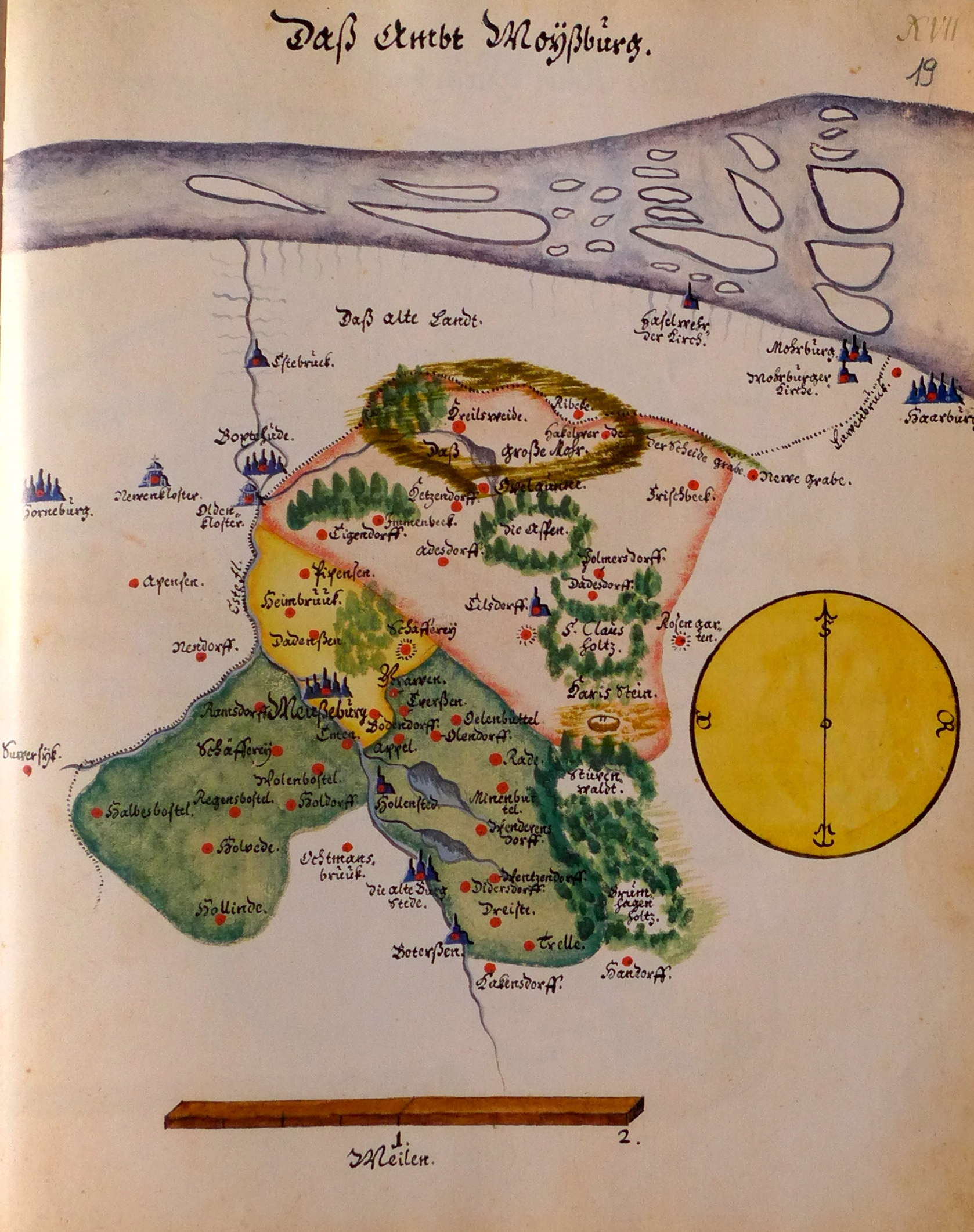 "Daß Ambt Meußeburg" (Das Amt Moisburg) – Reproduktion der im Niedersächsischen Landesarchiv, Abteilung Hannover, lagernden Kopie um 1678 (vgl.